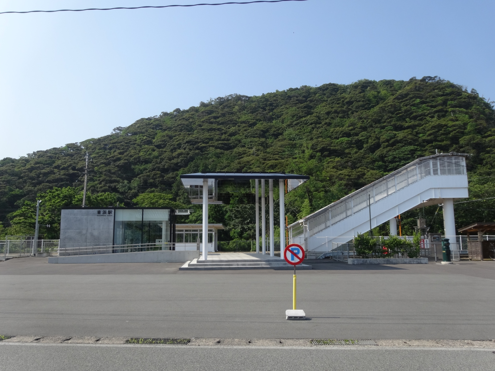 2017年に改築された東浜駅（鳥取県岩美郡岩美町）の外観 Sony Cyber-shot DSC-WX300